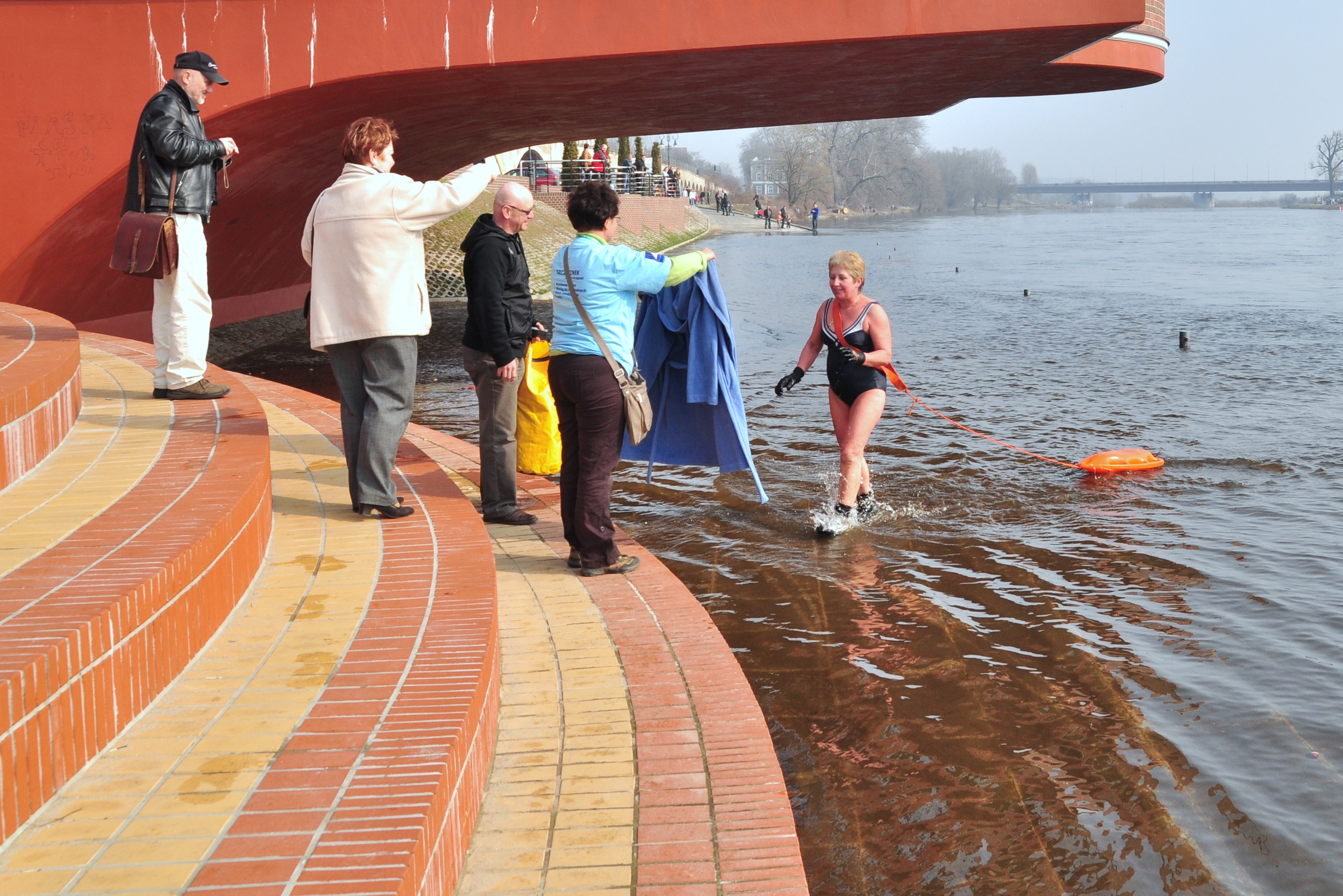 Po przepłynięciu rzeki przy temperaturze wody 4,5 stopnia Celsjusza. 18 marca 2012 r. - Warta w Gorzowie.